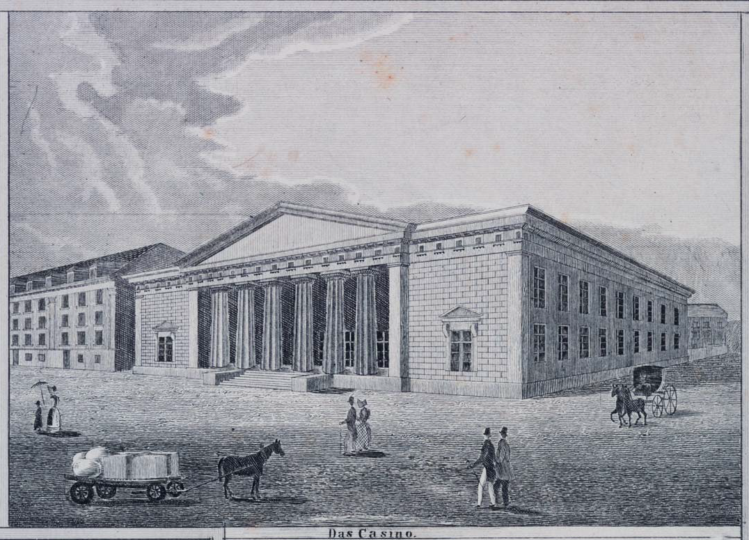 Das Casino, Detail aus Henry Abbot, Elberfeld im Grundriß und mit seinen vorzüglichsten Gebäuden, 1828, Lithographie. Kunsthaus Braun Antiquariat